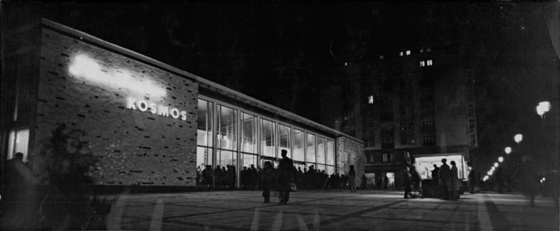 Berlin, Kino "Kosmos", Nacht Zentralbild Eckleben 6.10.1962 "Kosmos" Kino eigeweiht Mit der Premiere des farbigen Cinemascope-Films "Totentanz im Pazifik" und eines neuartigen erstmals in Berlin gezeigten 70-Millimeter-Films wurde am 5.10.1962 das modernste und repräsentativste Filmtheater der DDR "Kosmos" in der Berliner Karl-Marx-Allee eingeweiht. UBz: Außenansicht des Filmtheaters "Kosmos".